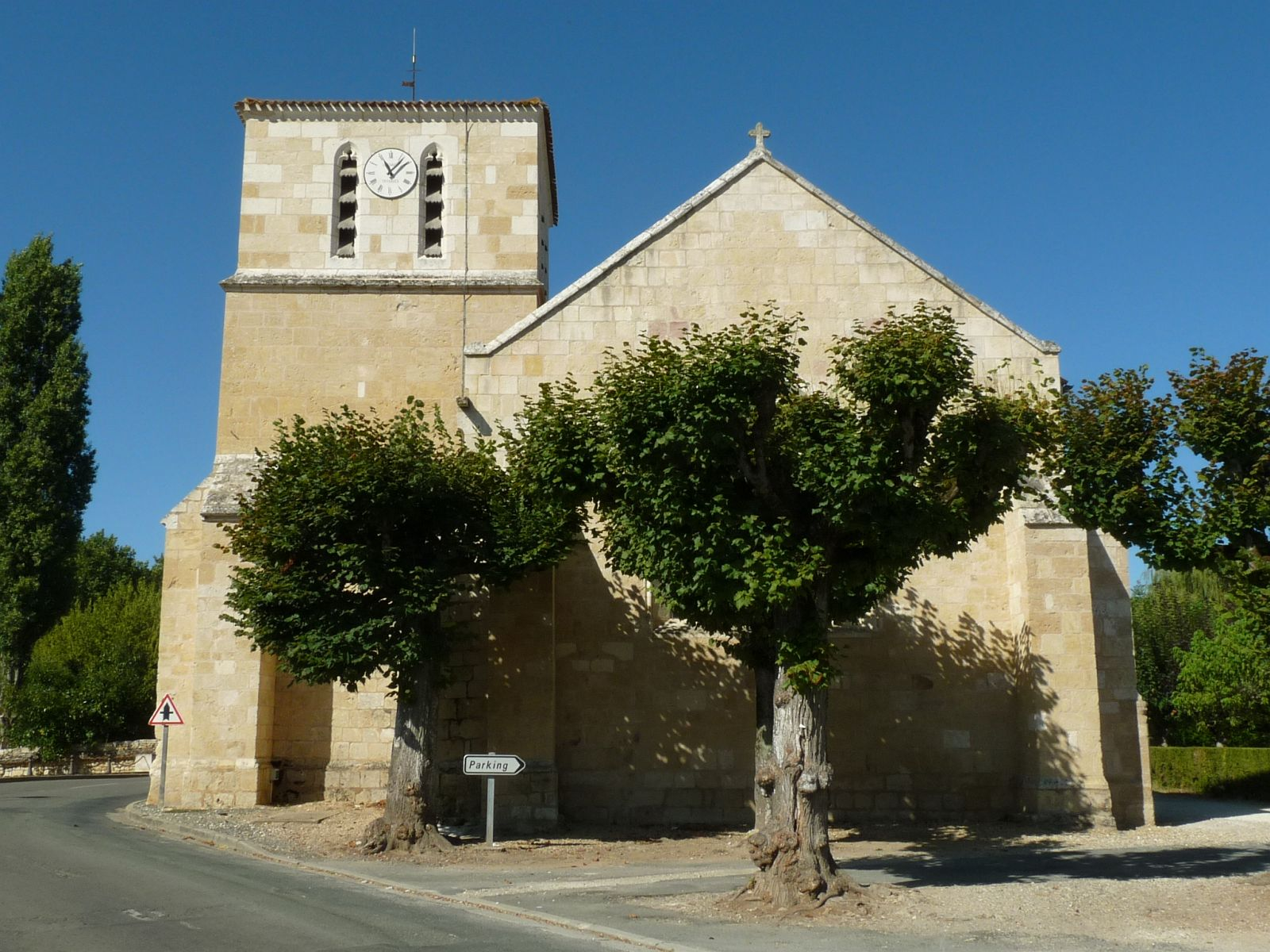 église de Cravans (17), France